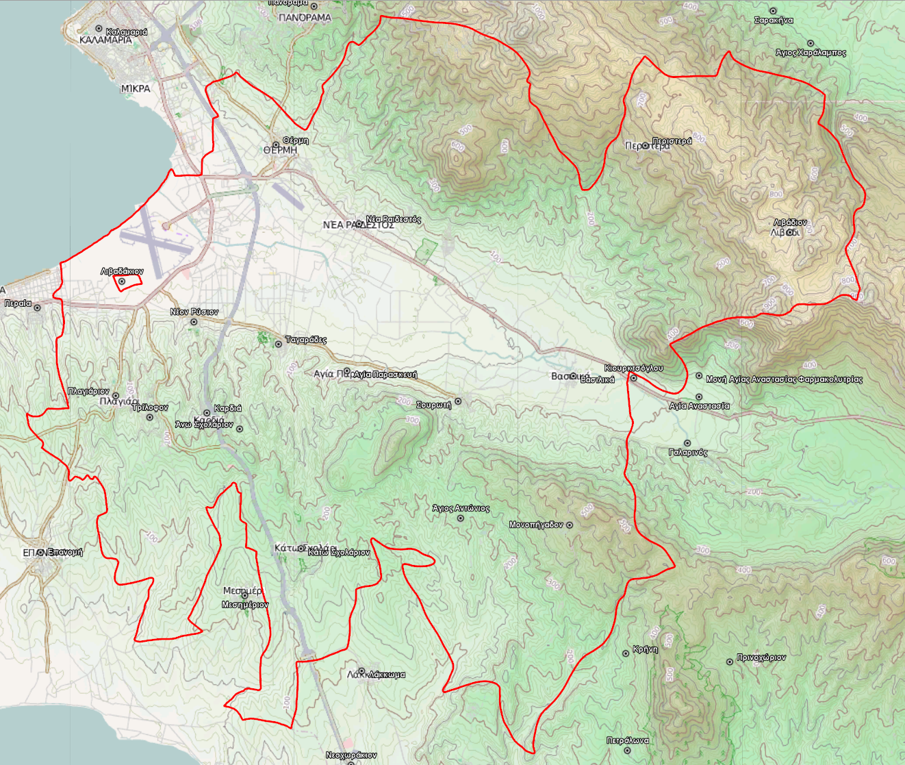 Τοπογραφικός χάρτης του Δήμου Θέρμης